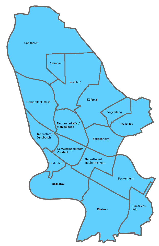 Stadtbezirke von Mannheim.